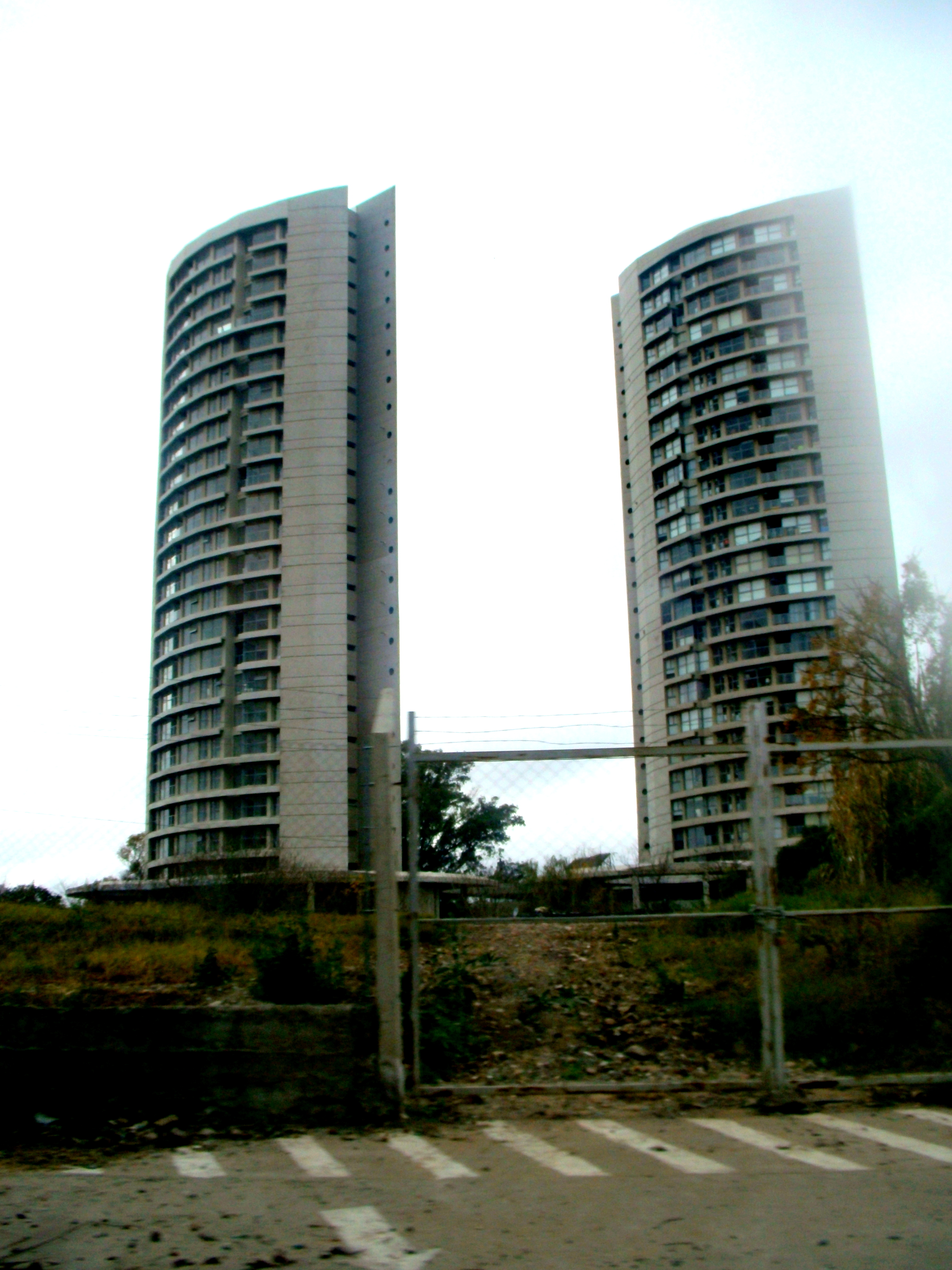 Los rascacielos Sonoma Ribera (Carlos Trigo, 2011-15) recientemente terminados. Córdoba, Argentina.